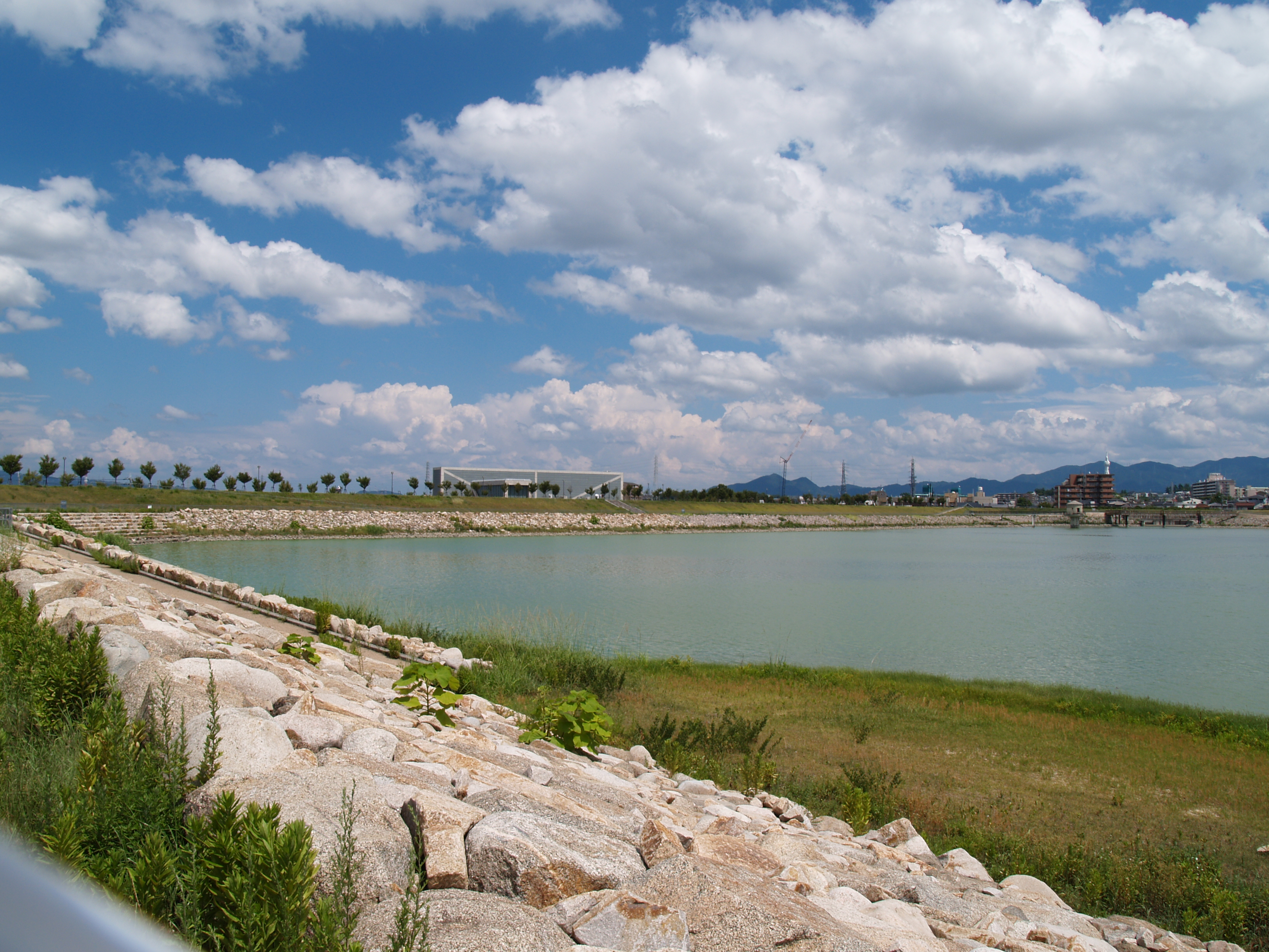 狭山池（南西側の湖畔にて）